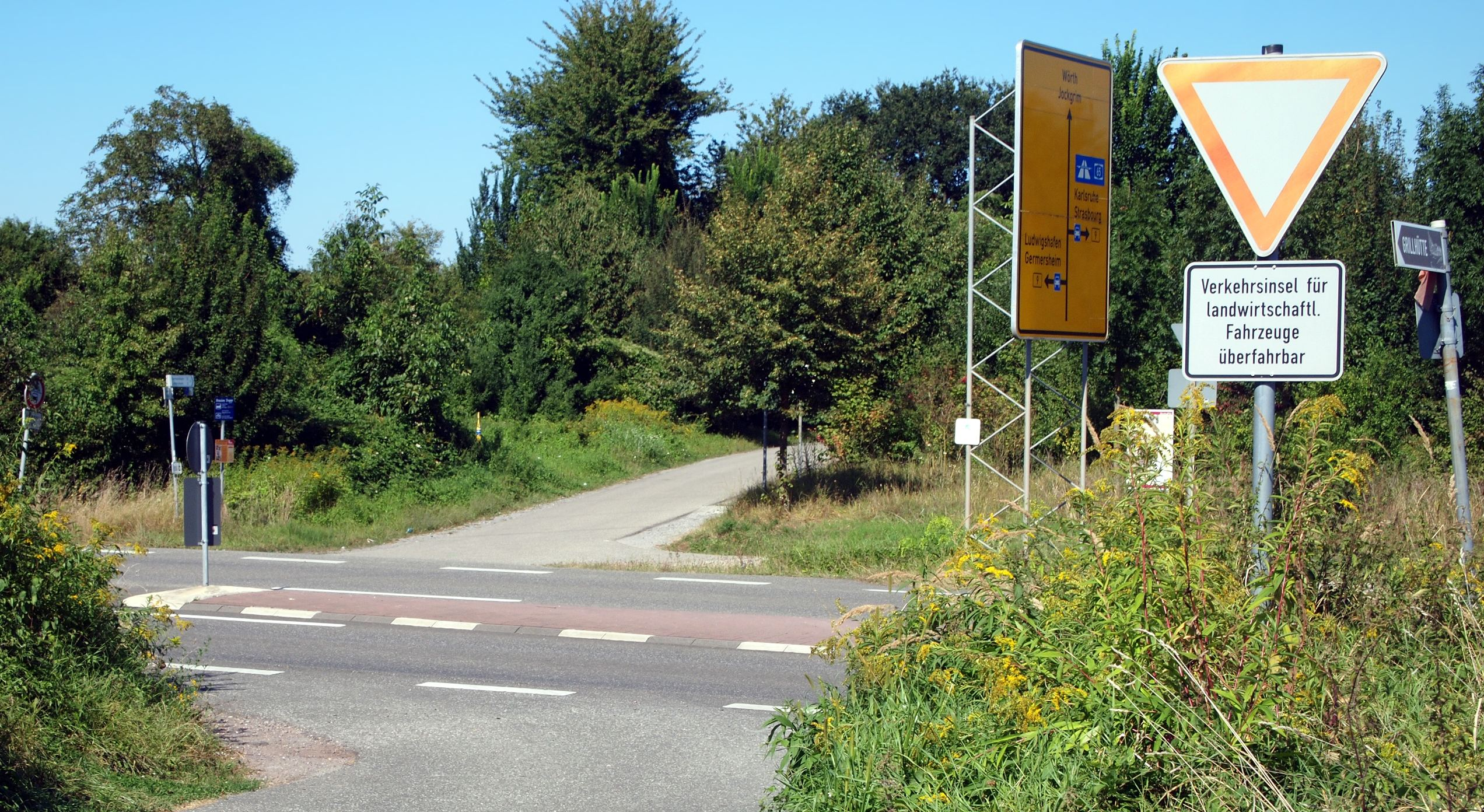 Verkehrsinsel für landwirtschaftliche Fahrzeuge überfahrbar